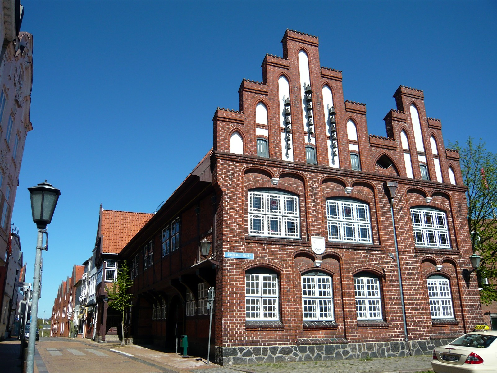 Das alte Rendsburger Rathaus an der Mühlenstraße